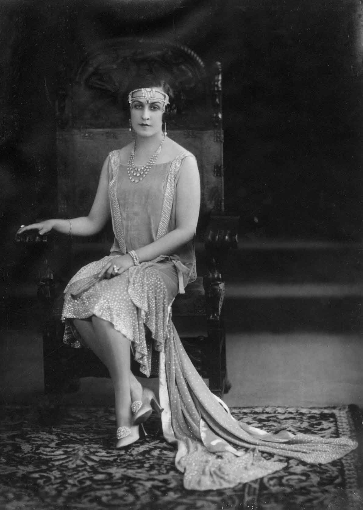 Fotografía de la Maria de los Reyes Laffitte y Perez del Pulgar. Condesa del Campo de Alange